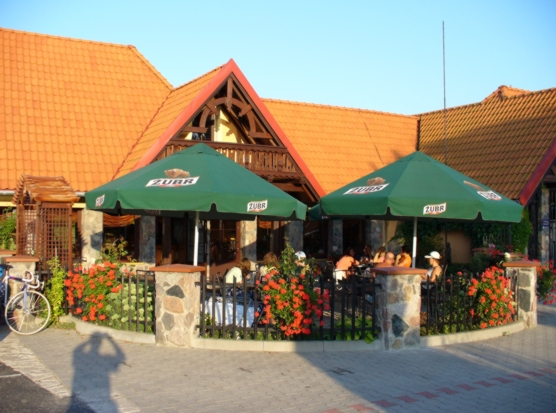 Ogonki k. Węgorzewa